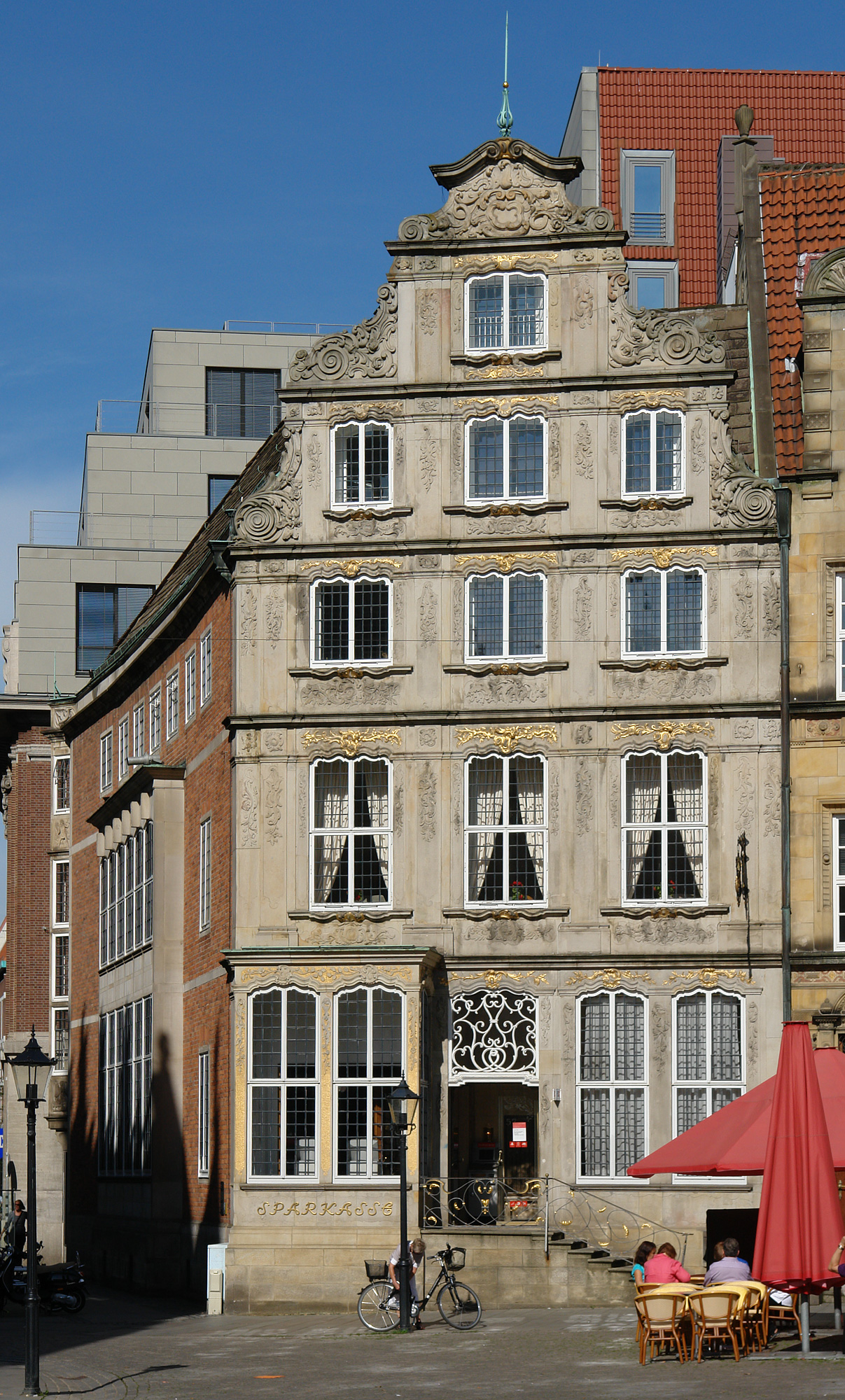 Sparkasse am Markt in Bremen, Am Markt 12 / Langenstraße 1 / Hakenstraße.Das abgebildete Objekt ist ein geschütztes Kulturdenkmal in der Freien Hansestadt Bremen, mit der Nr. 0071 beim Landesamt für Denkmalpflege registriert.